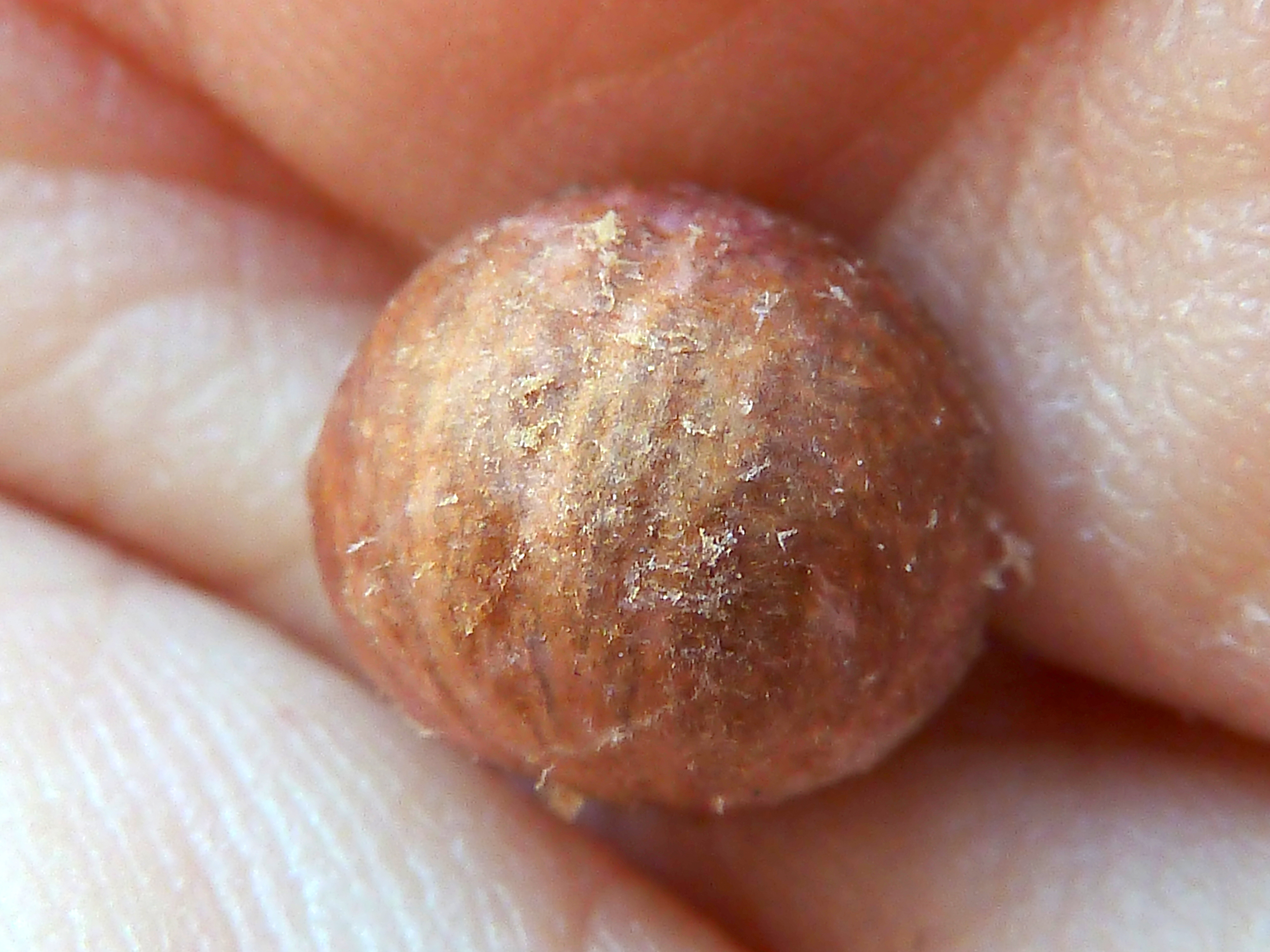 Syzygium australe - Semilla - Cultivado/ornamental, Esplanada del Puerto, Águilas, Provincia de Murcia (España).